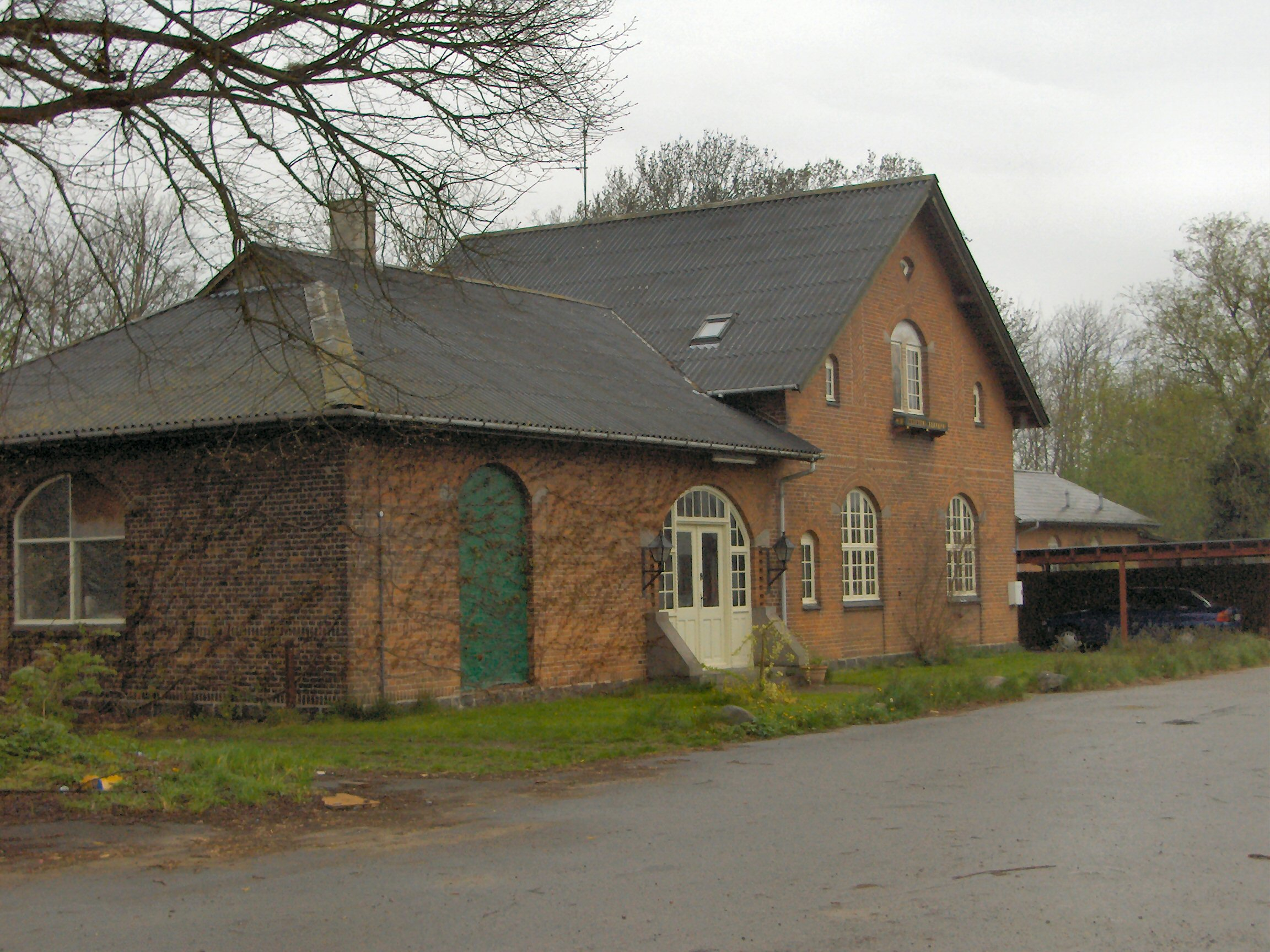 Store_Fuglede_Station